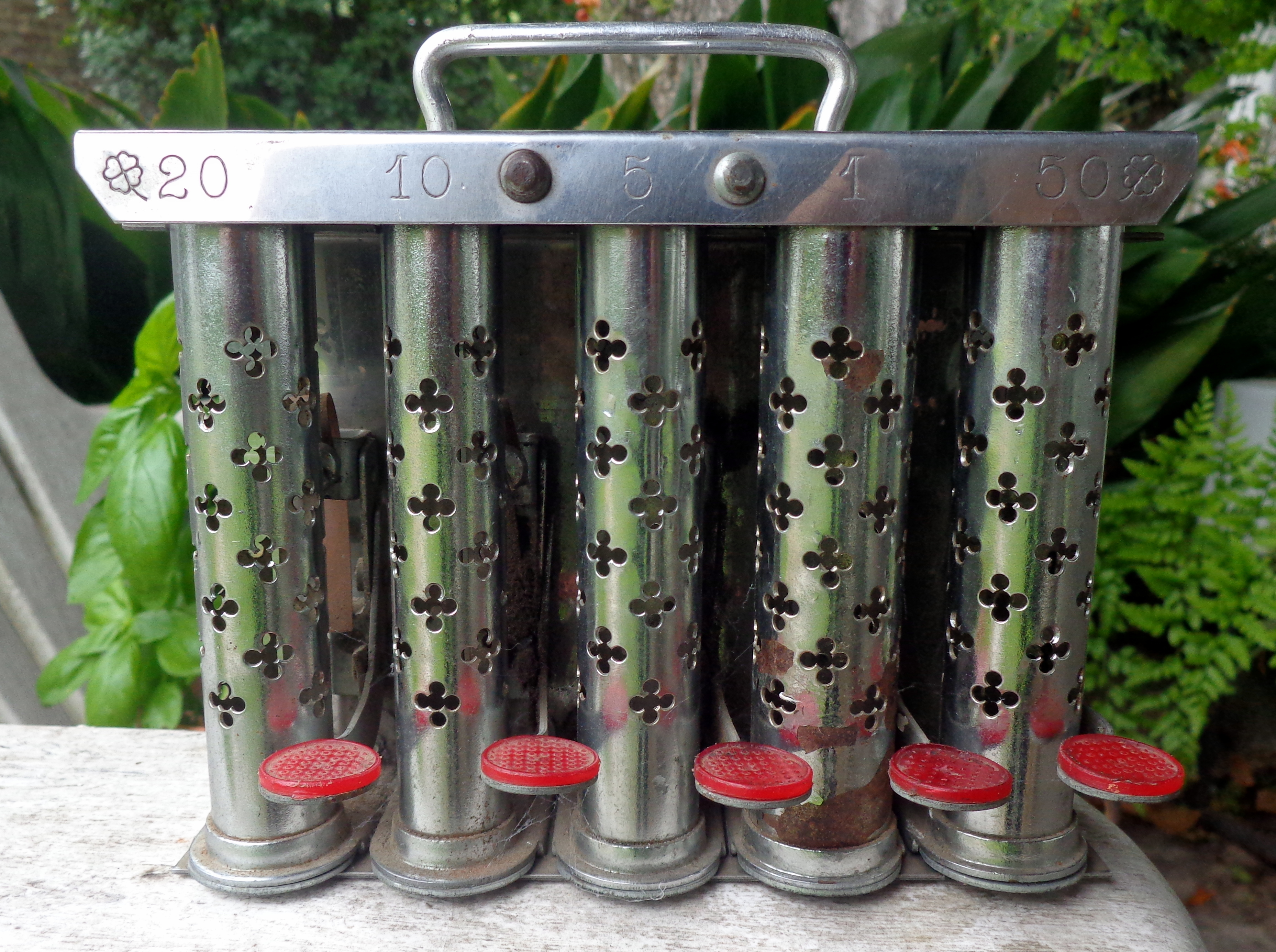 Clasica maquinita manual de expender monedas en los colectivos de Buenos Aires